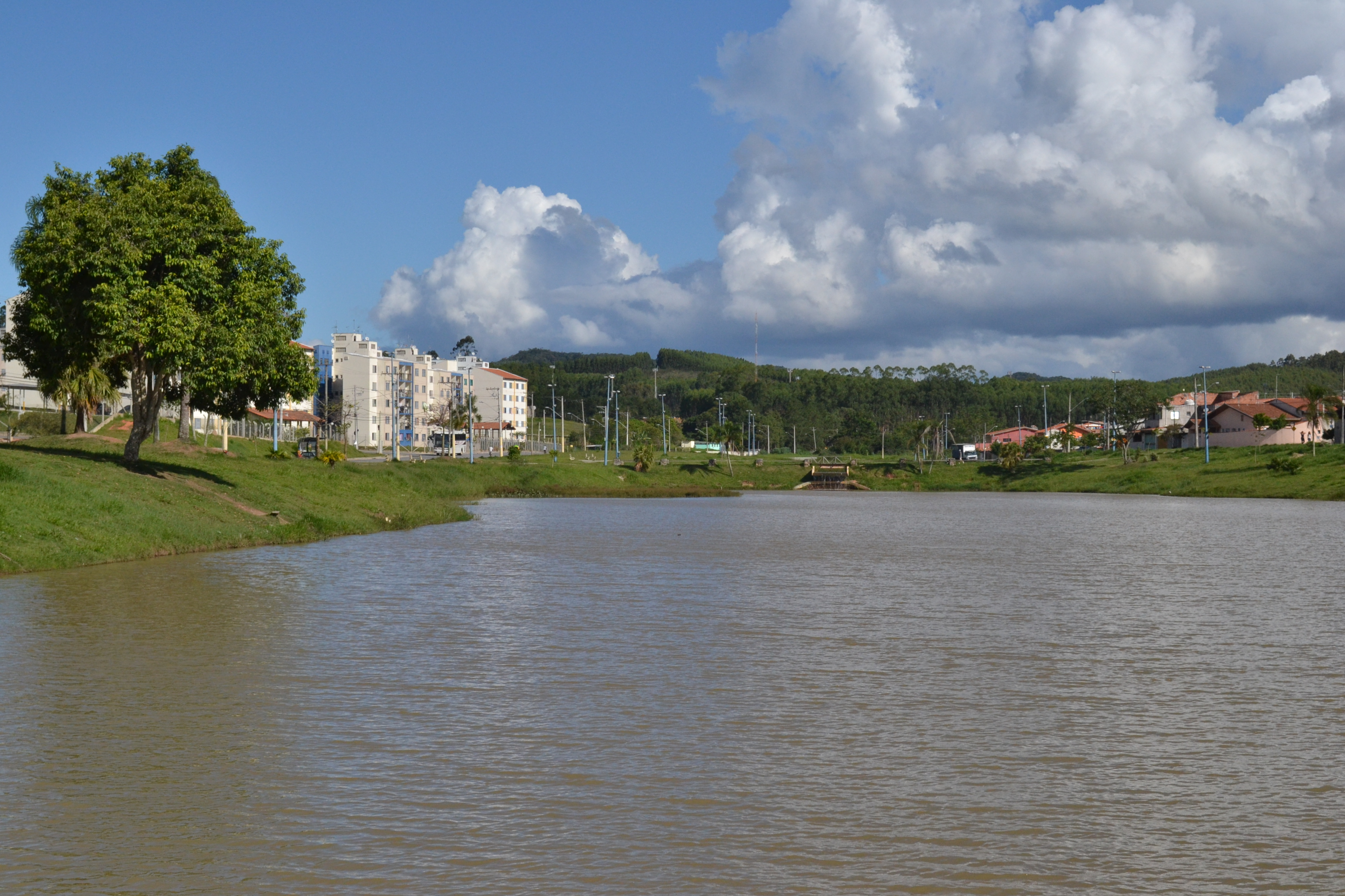 Cartão postal do Parque Interlagos